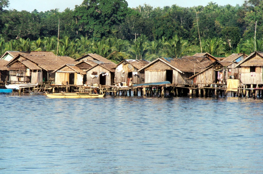 Philippinen Basilan Seezigeuner